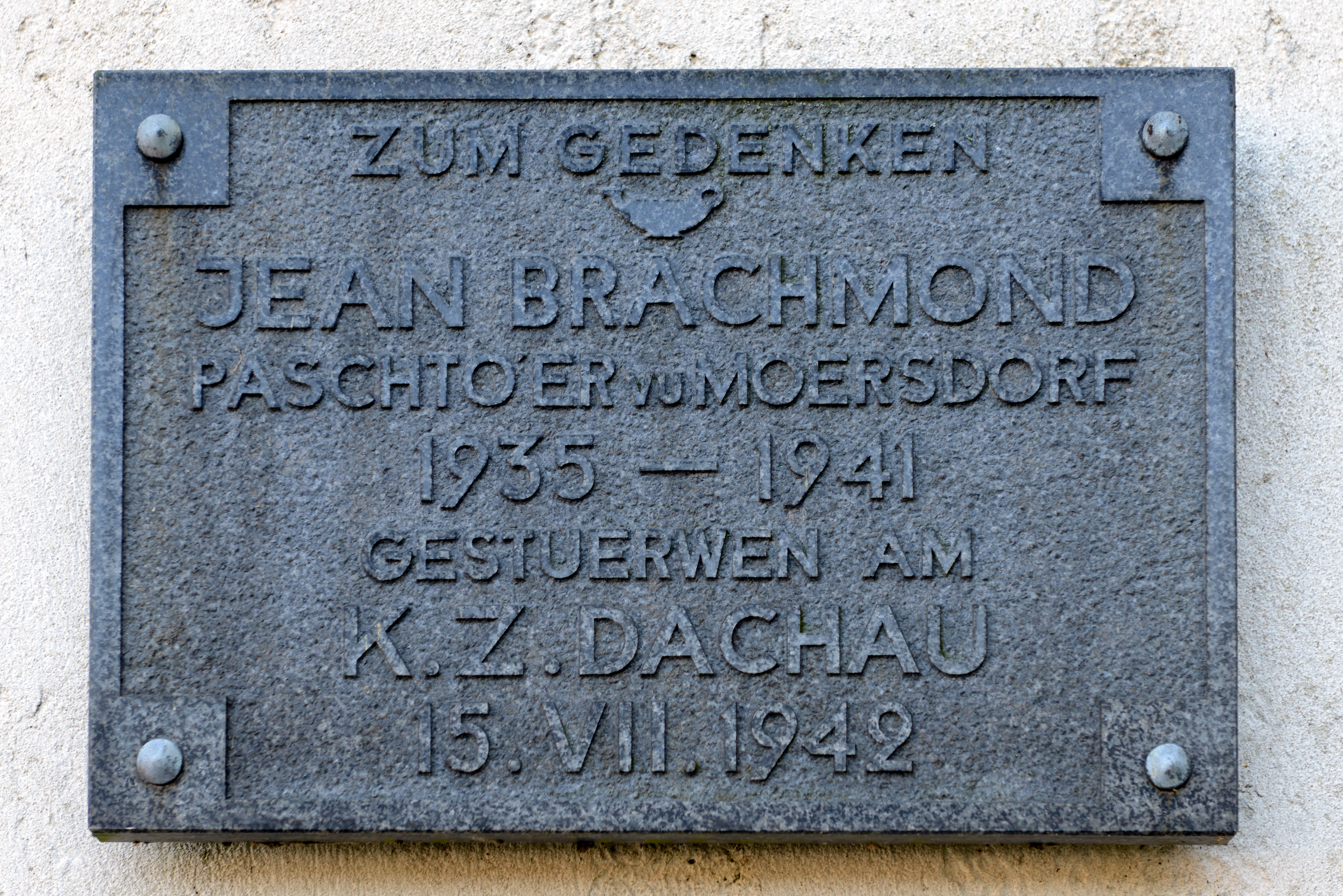 Bei der Entree vun der Kierch zu Méischdref d'Erënnerungsplack un de Paschtouer Jean Brachmond deen 1942 zu Dachau vun de Preisen ermuert gouf.